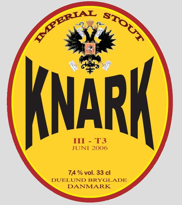 Knark öletikett/Knark beerlabel